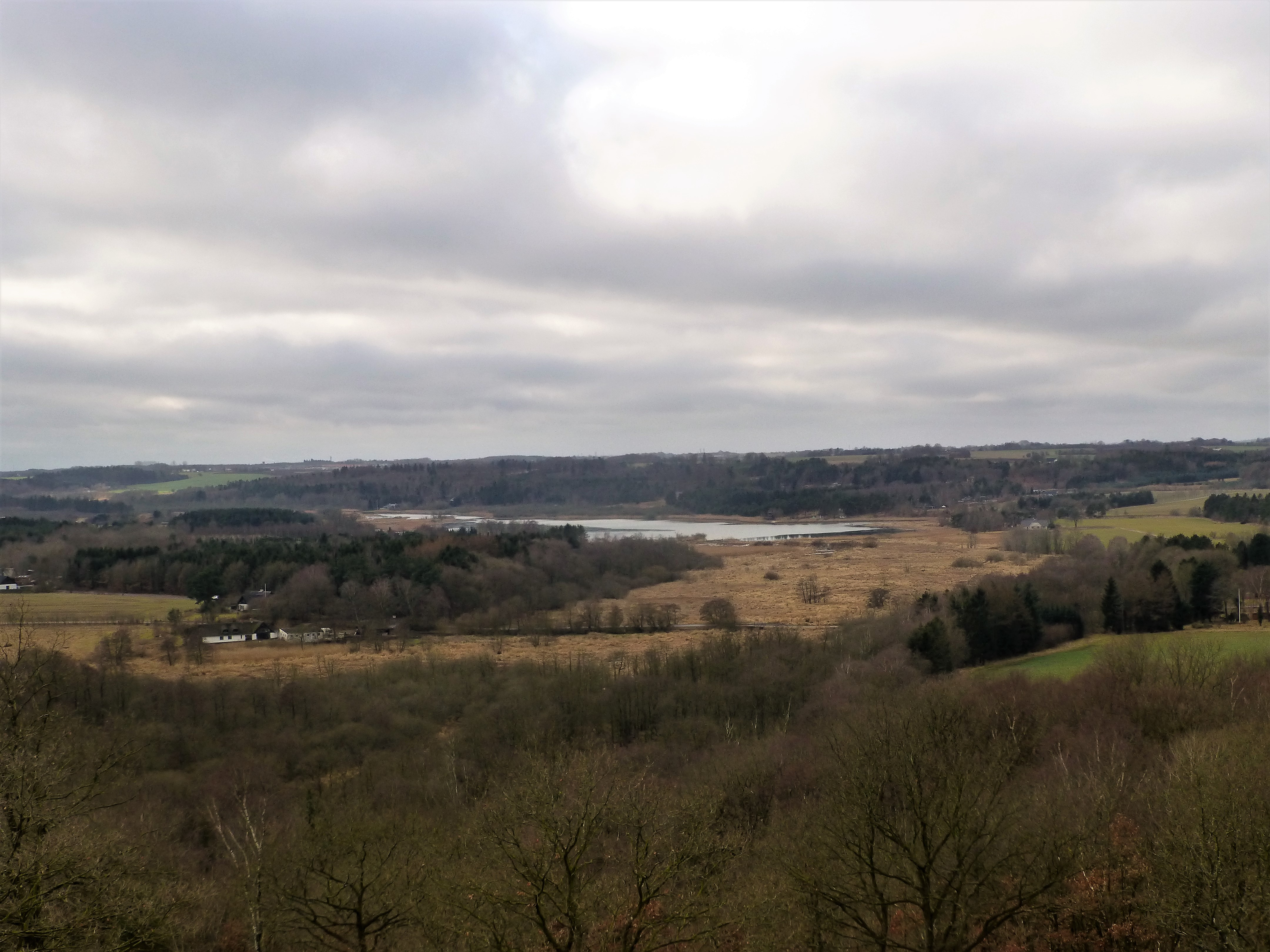 Sminge Sø set fra Store Troldhøj